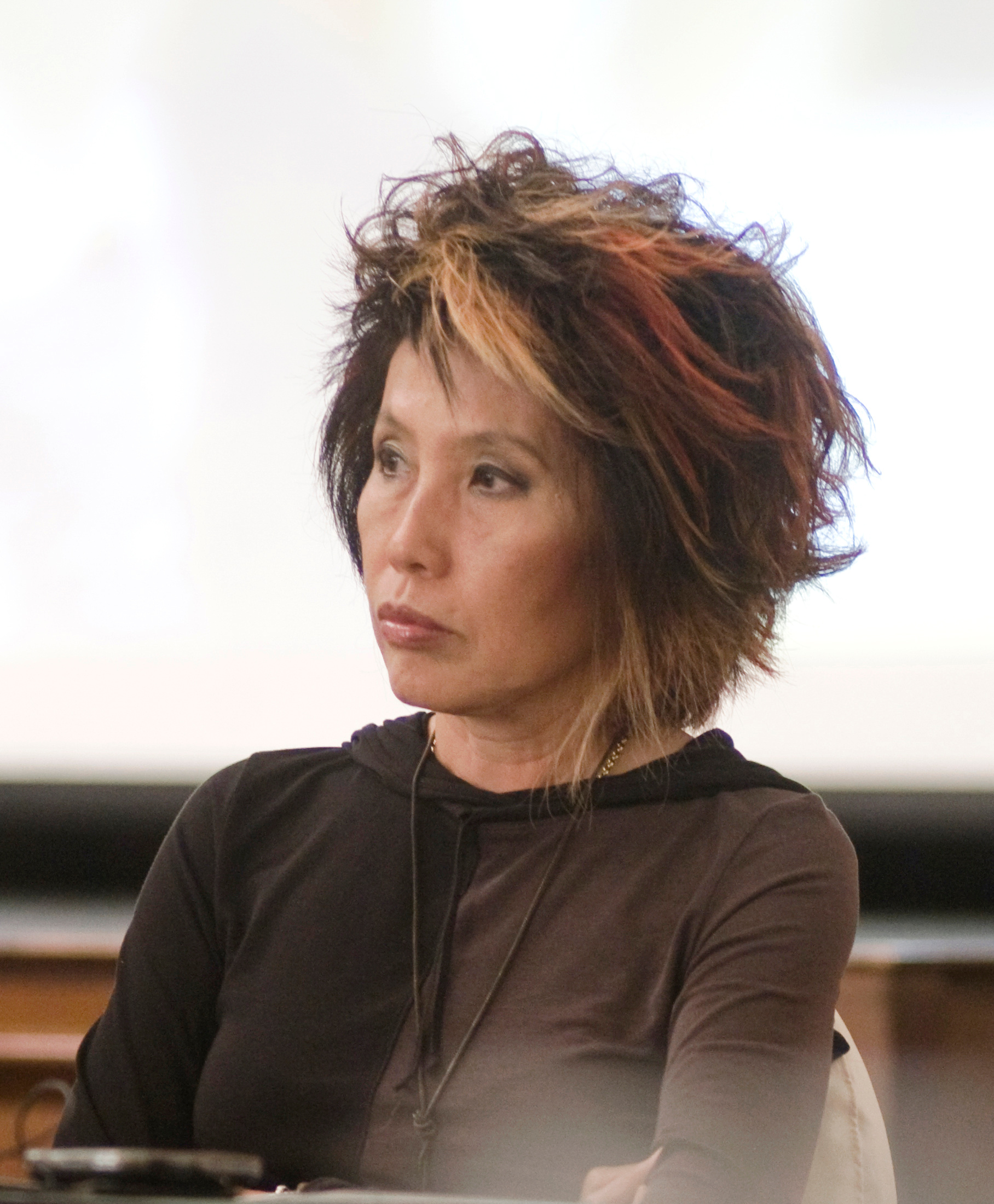 พญ.พรทิพย์ โรจนสุนันท์ นายกรัฐมนตรีเป็นประธานในการประชุมชี้แจงสถานการณ์ความไม่สงบในประเทศต่อคณะ ทูตานุทูต หัวหน้าองค์กรระหว่างประเทศ และประธานหอการค้าต่างประเทศ ณ ตึกสันติไมตรีหลังนอก ทำเนียบรัฐบาล วันที่ 29 พฤษภาคม 2553 (The Official Site of The Prime Minister of Thailand Photo by พีรพัฒน์ วิมลรังครัตน์)